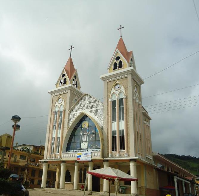 Iglesia San Jaacinto de Alamor